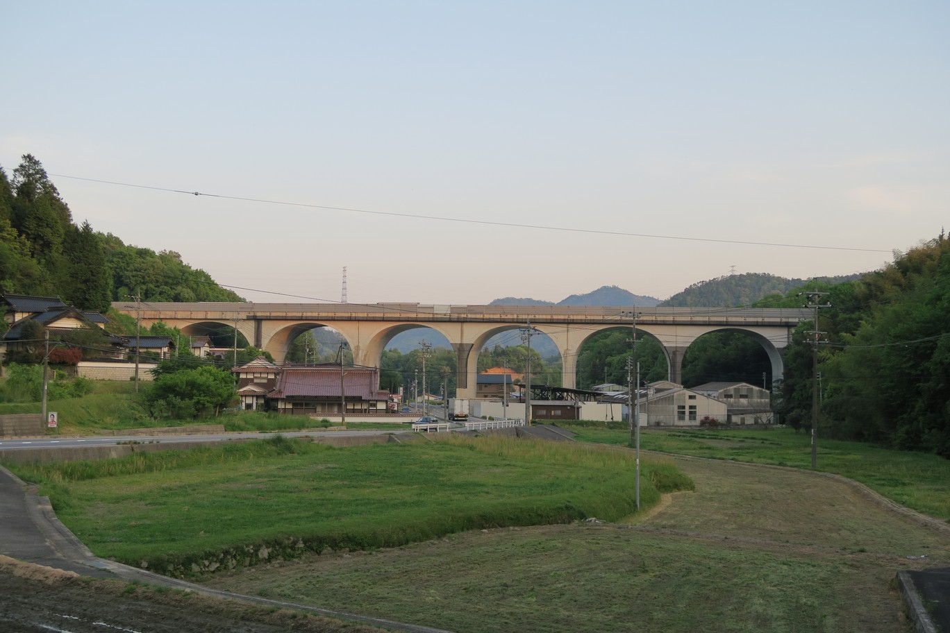 椛坂高架橋（北側から撮影）